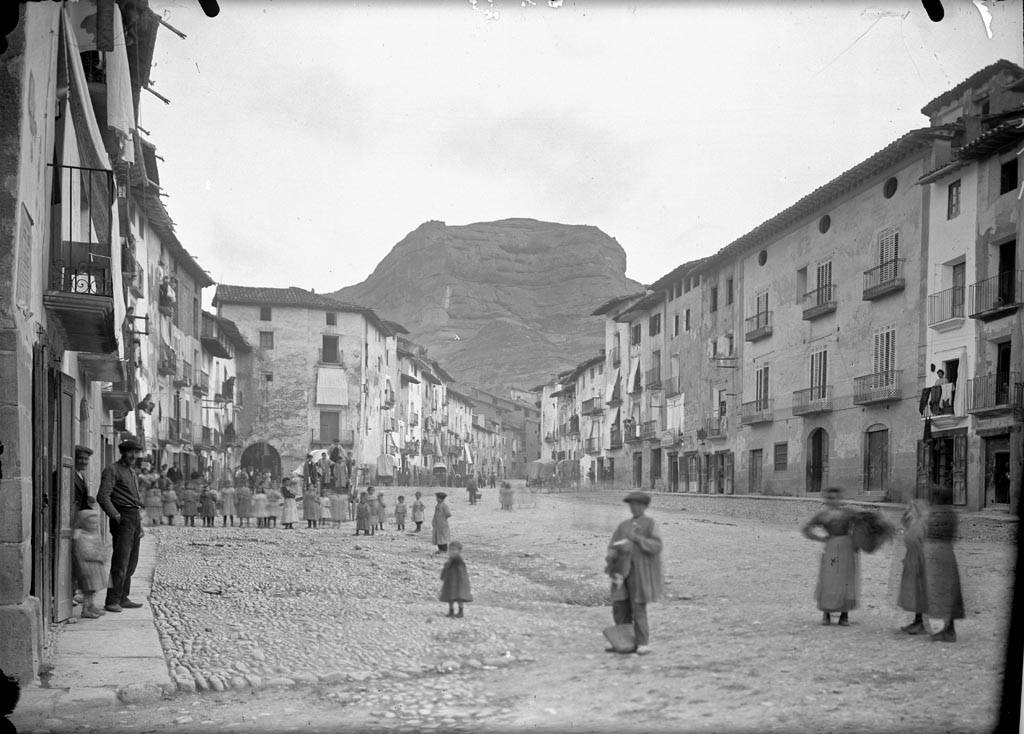 Imatge